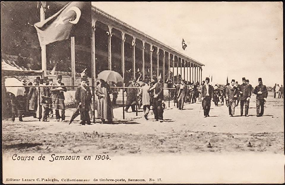 Günümüzde Gülsan Sanayi Sitesi'nin bulunduğu alanda yer alan Samsun Hipodromu'nun 1904 yılına ait bir fotoğrafı.